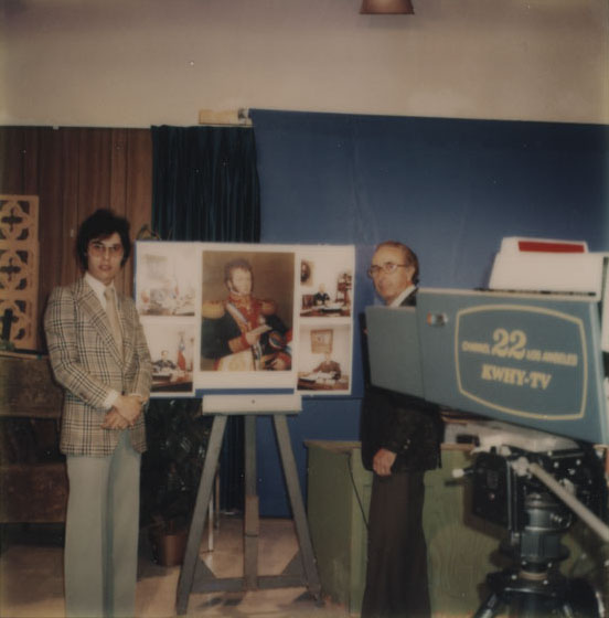 Programa "Chile", transmitido por KWHY-TV (Los Angeles, California) el 21 de mayo de 1976. De izquierda a derecha: Sergio Chacón, Cónsul Honorario y Adjunto encargado del Consulado General de Chile en Los Angeles; y León Barroso, director del Programa "Una Ventana a Latinoamérica".